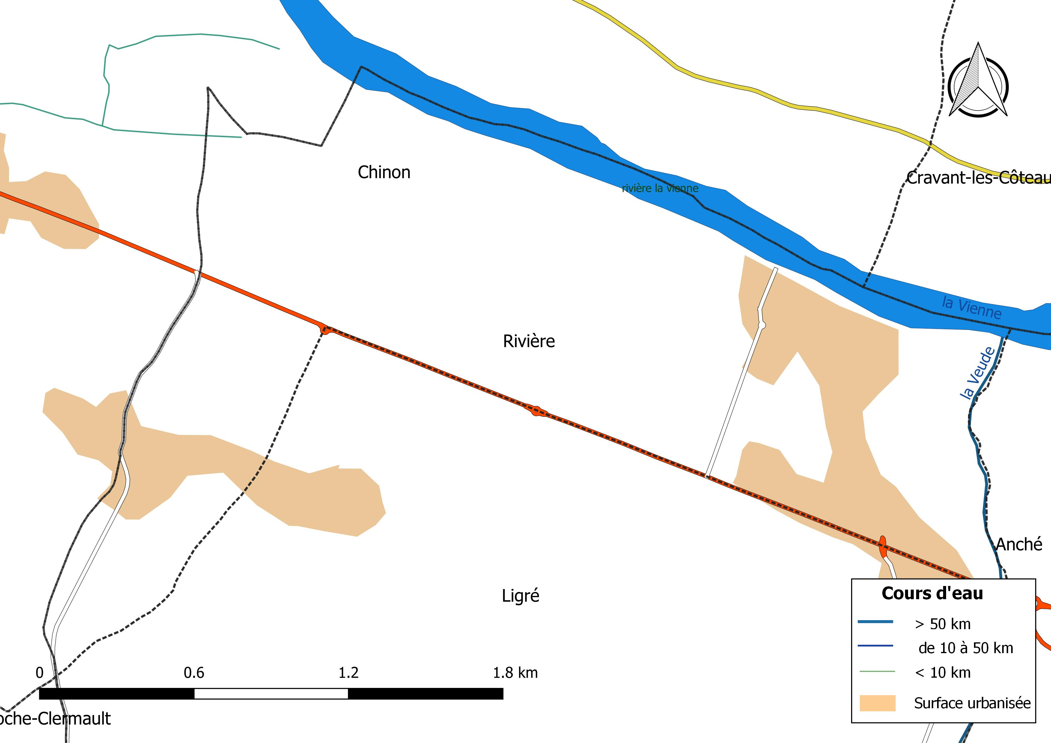 Carte du réseau hydrographique de la commune de Rivière (Indre-et-Loire) (France).